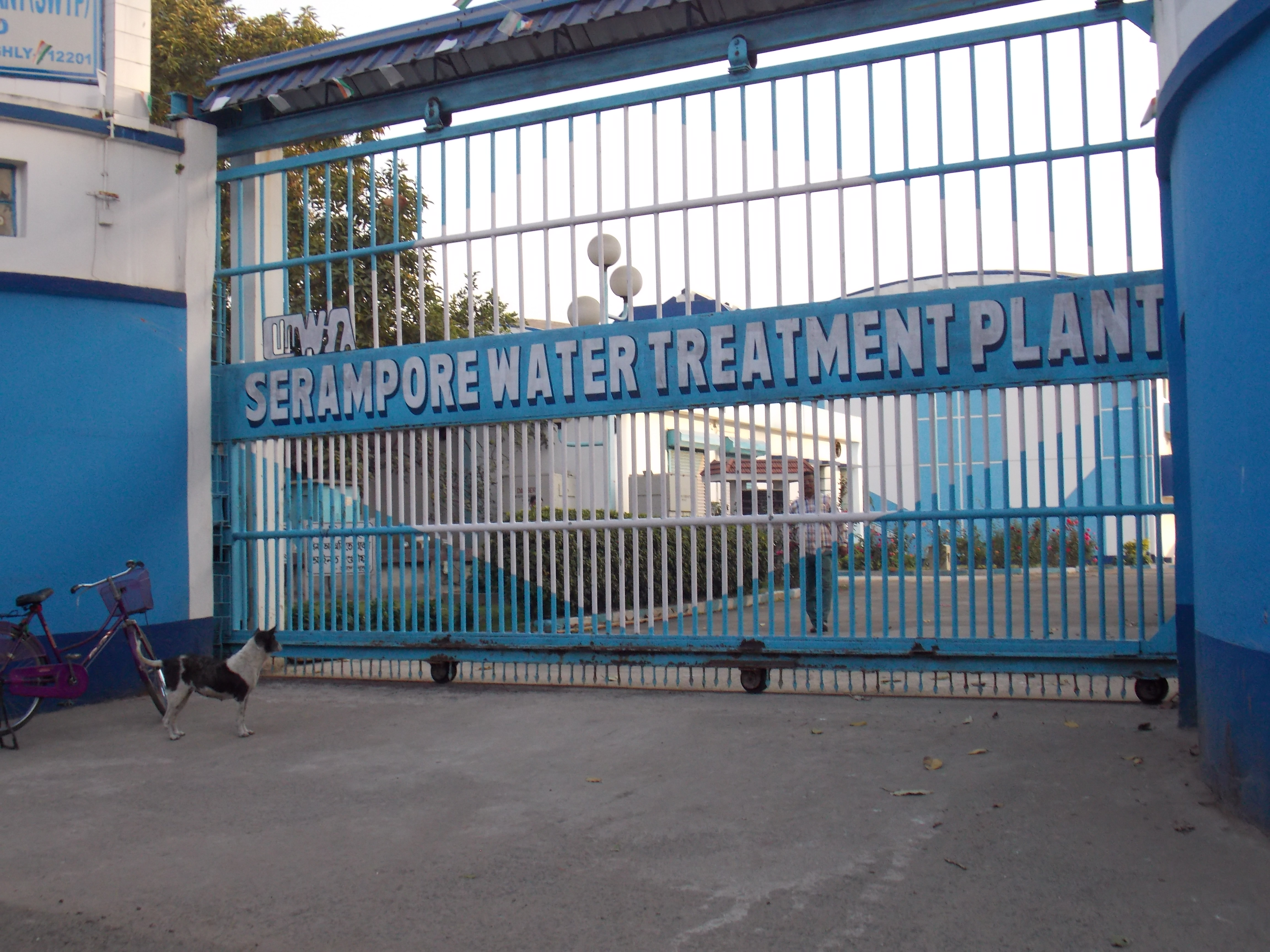 water supply to 7 municipalities